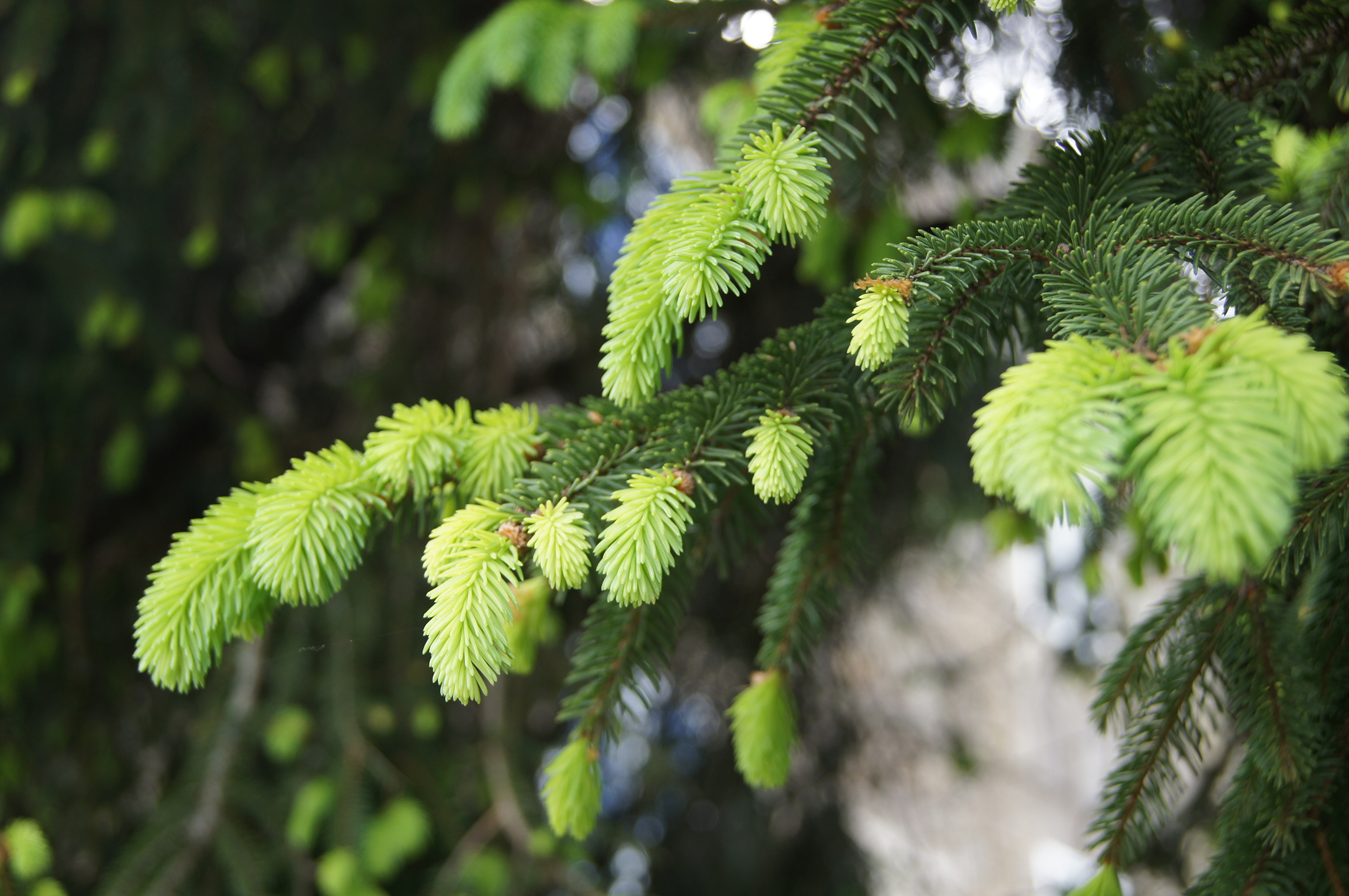 Realizada en Negreira (A Coruña)